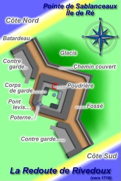 Plan de la Redoute de Rivedoux vers 1718, construite par Vauban - Rivedoux-Plage - Île de Ré - Charente Maritime - France